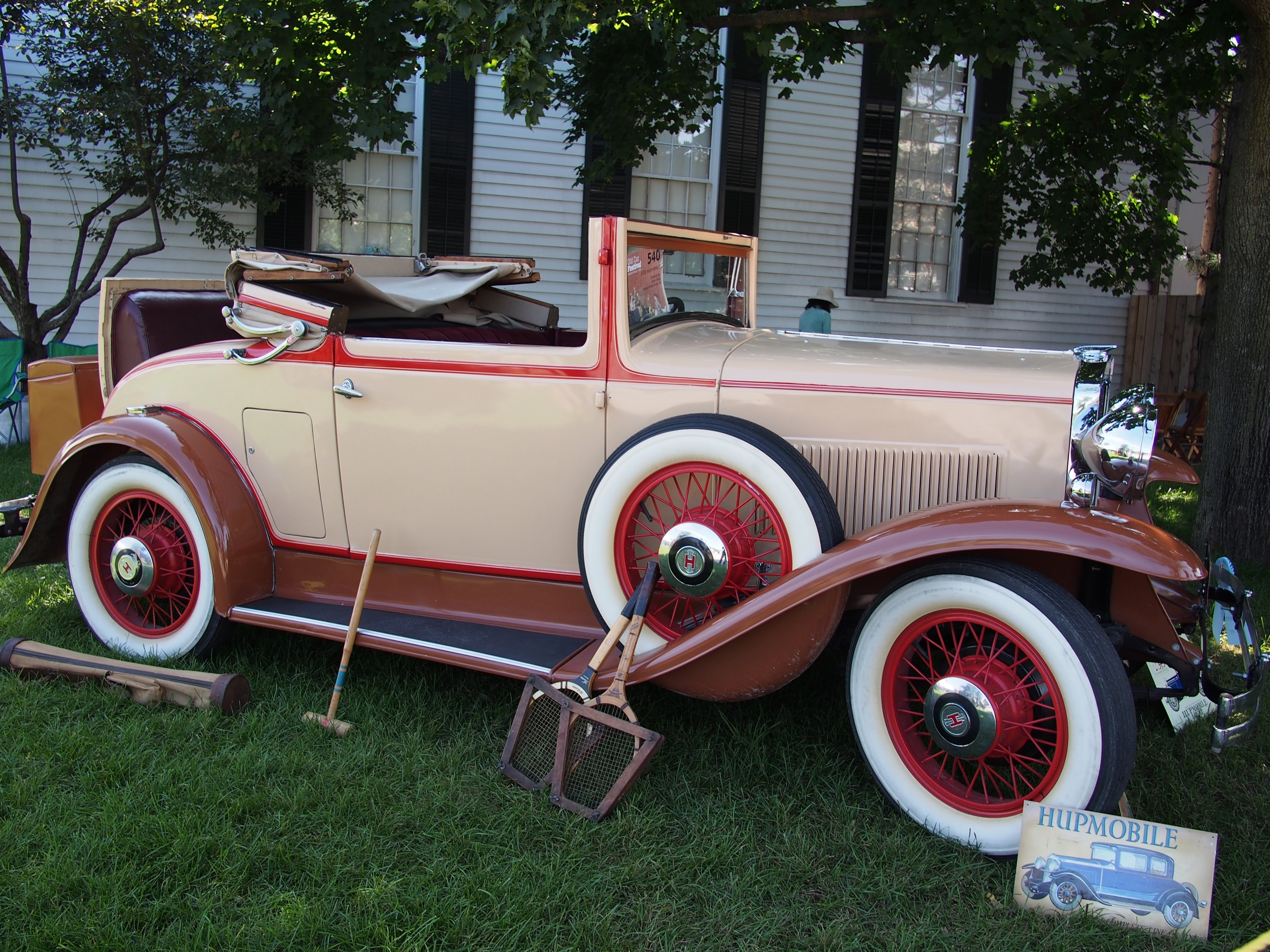 1930 Hupmobile Model S